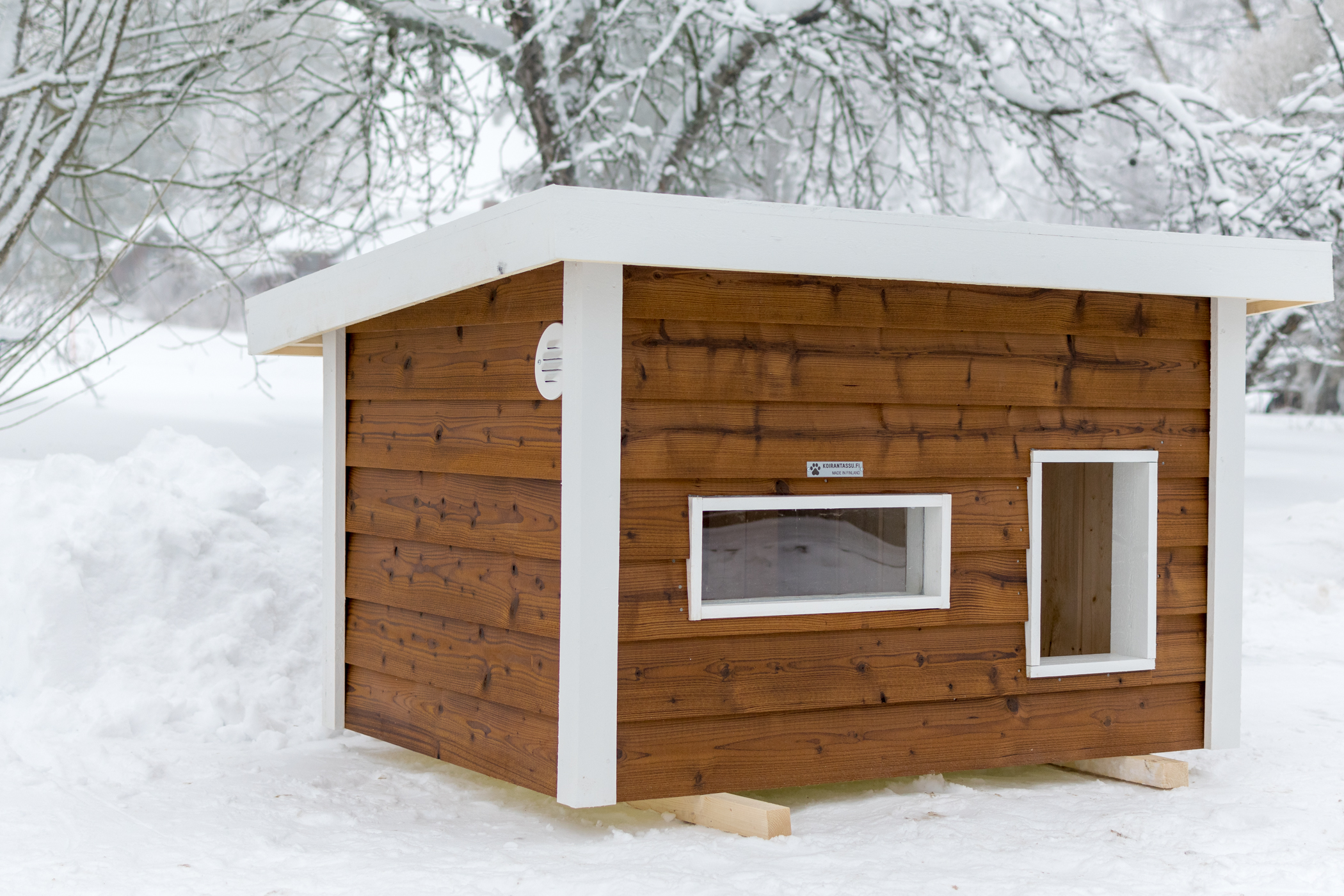 Lämpöeristetty koirankoppi eteisellä ja makuuhuoneella